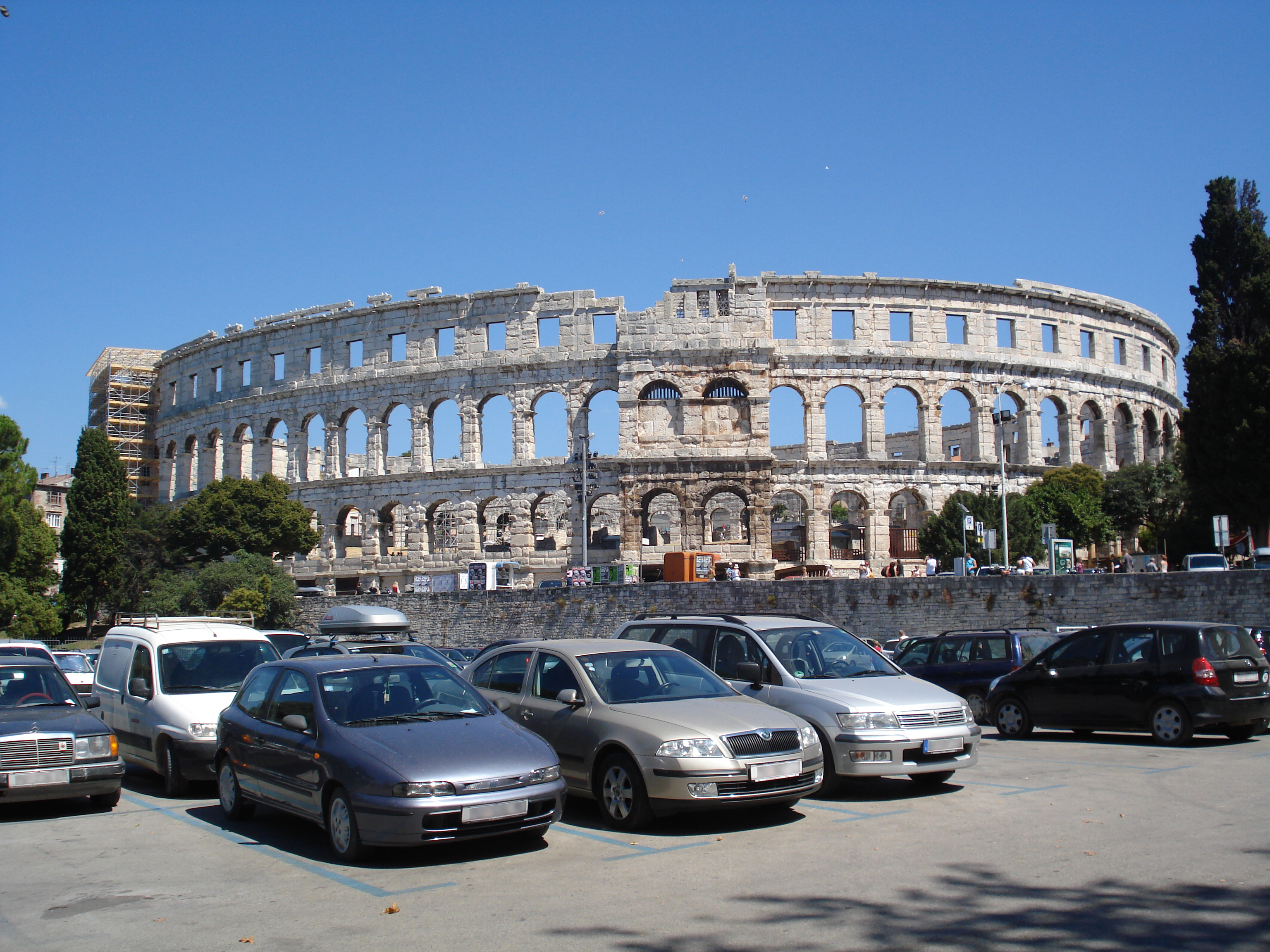 Pólai amfiteátrum, Horvátország